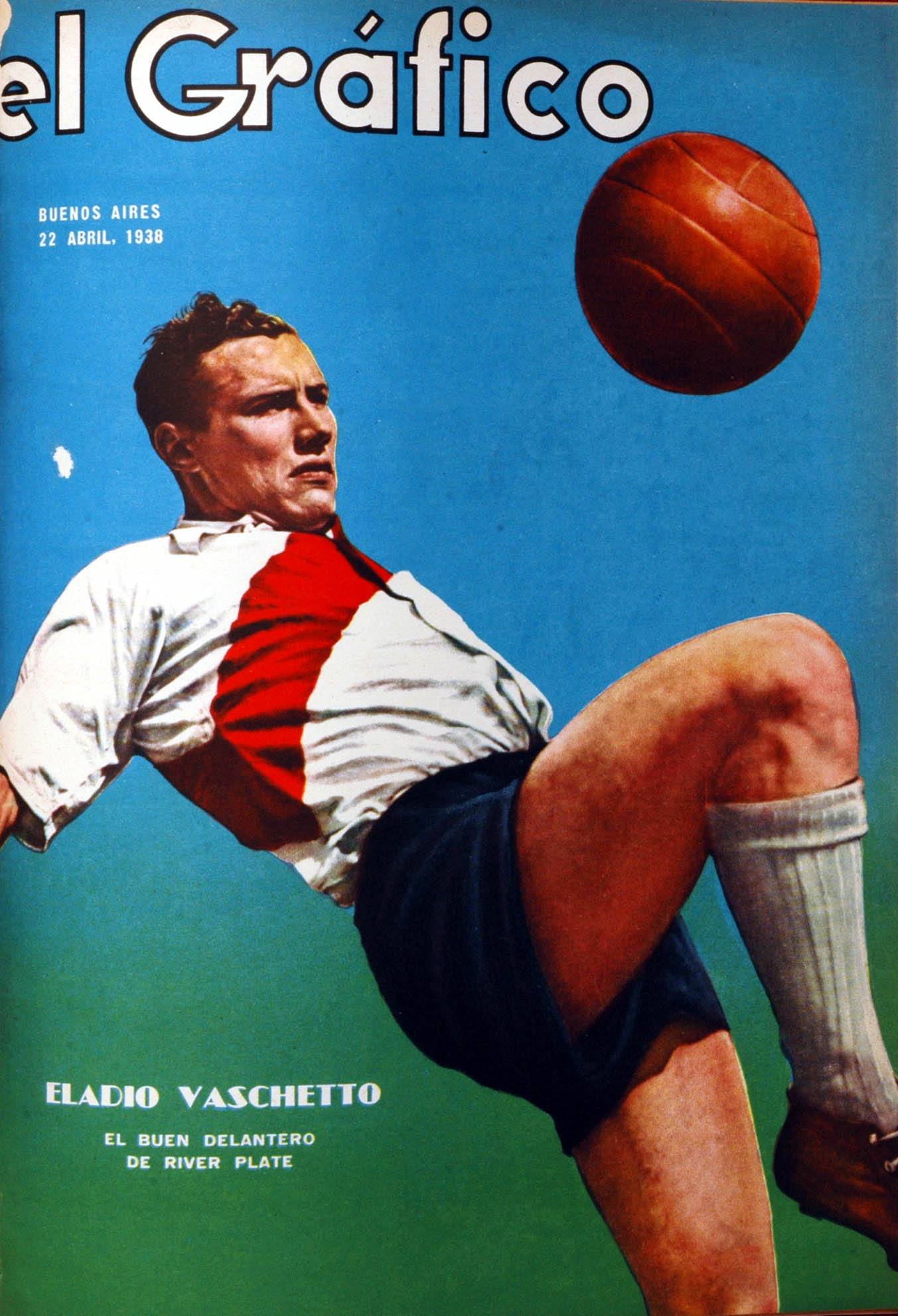 El Grafico del 22 de Abril de 1938. Edicion 980